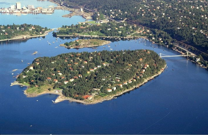 Flyfoto av Ulvøya i Oslo 1965